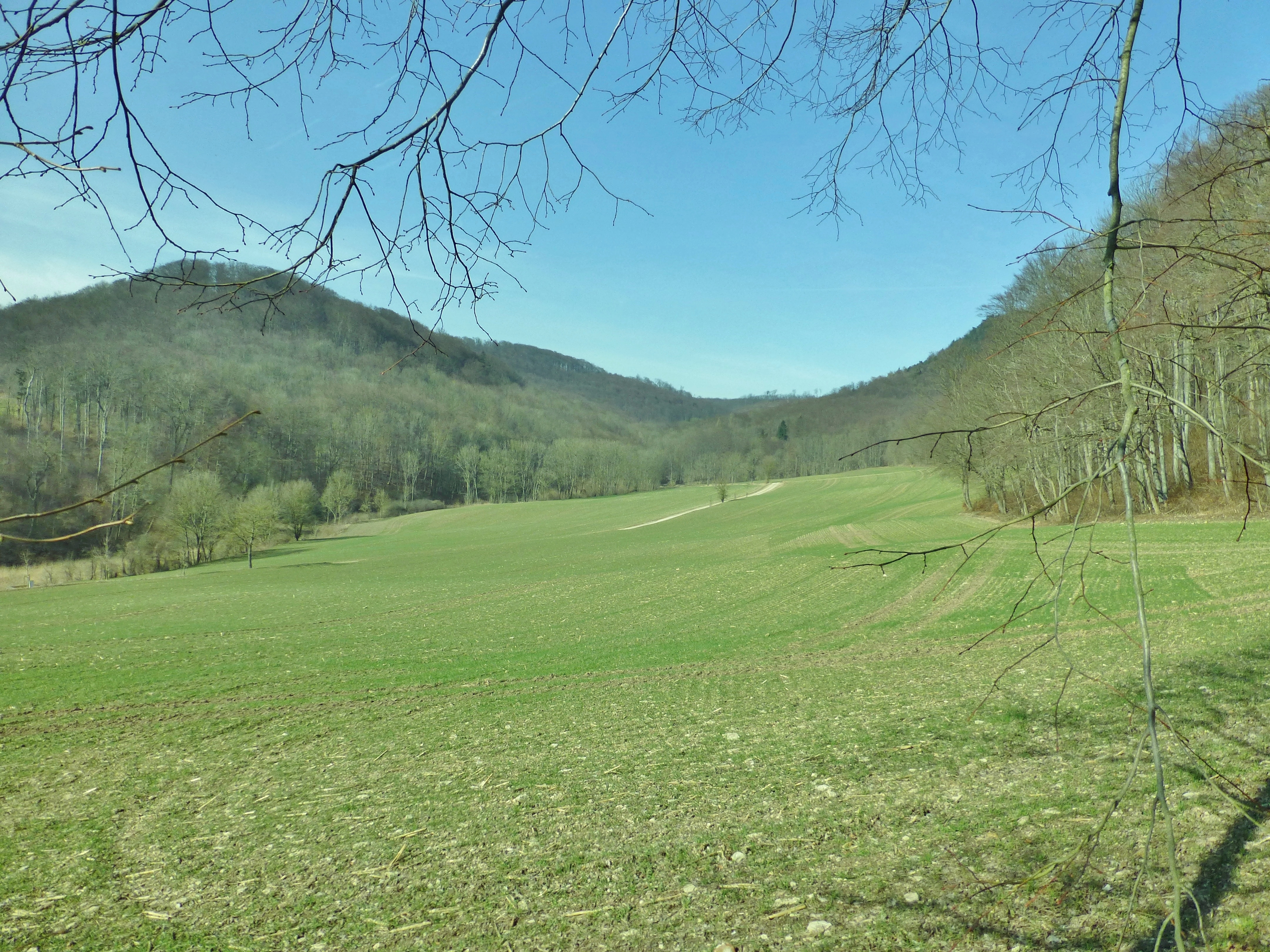 Blick ins Tal Richtung Silbergrund (links der Fernstein und rechts der große Kranzberg im NSG Bodenstein)